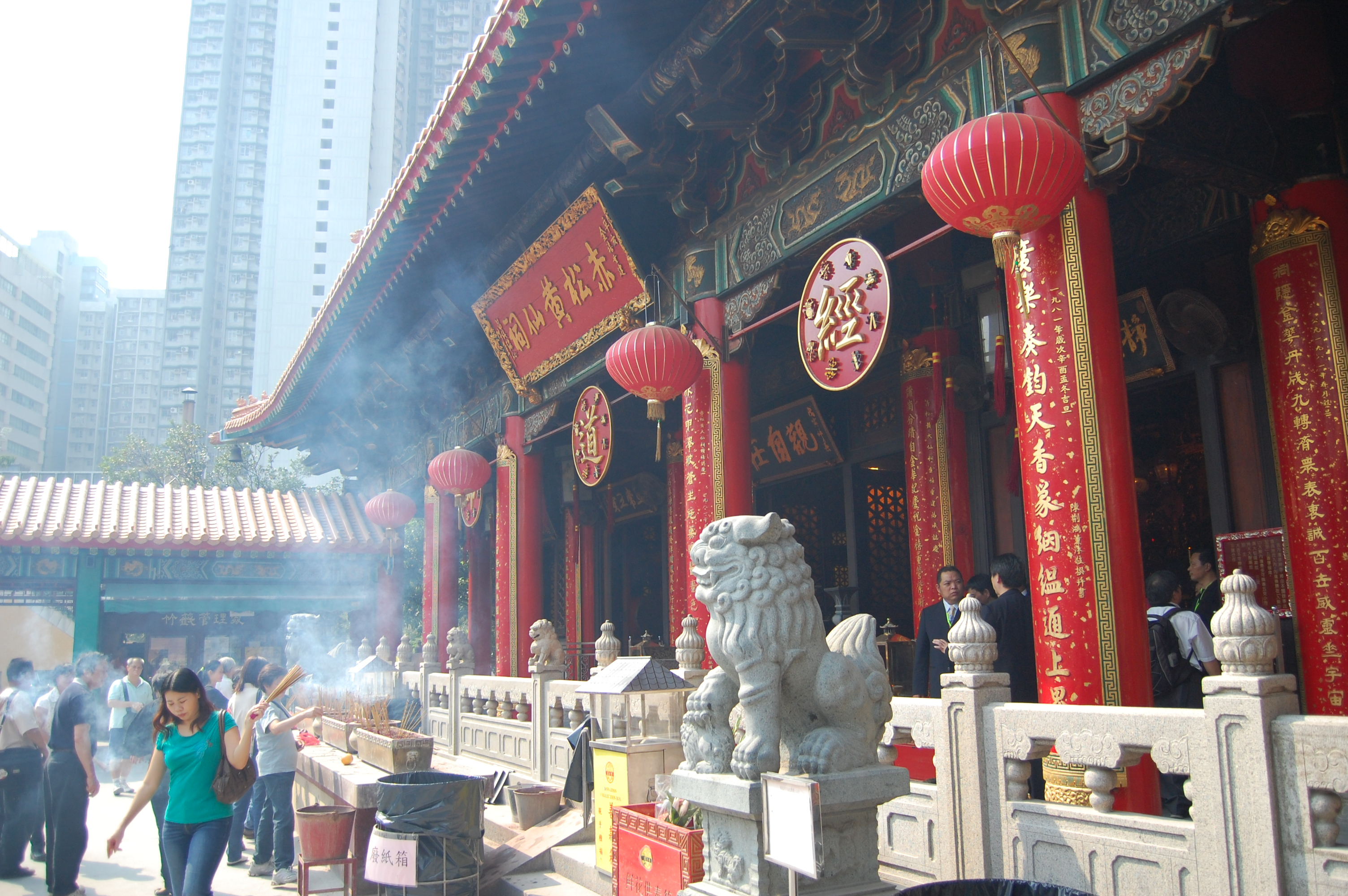 Sik Sik Yuen Wong Tai Sin Temple